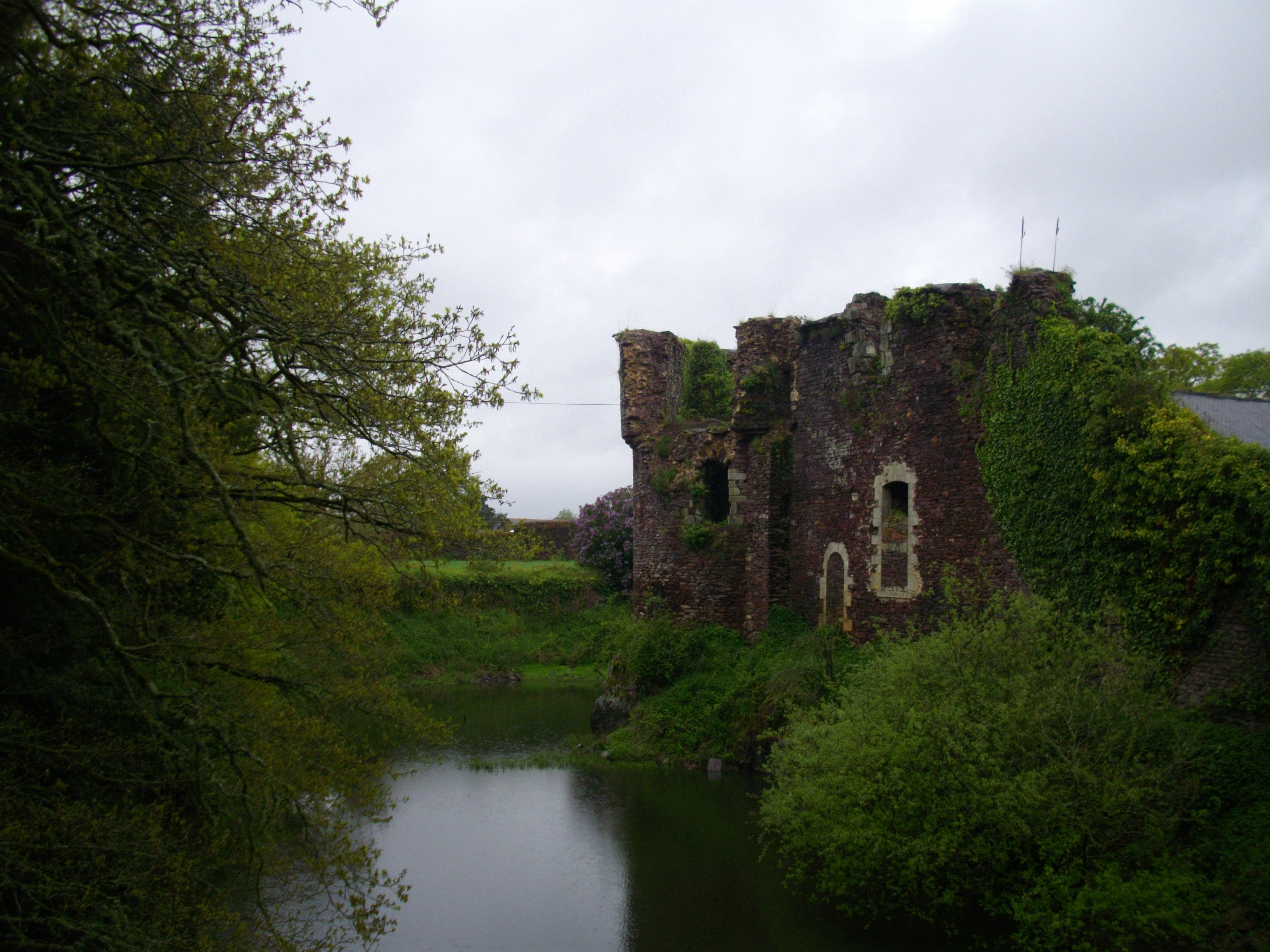 Le chateau de Comper, ancien rempart féodal